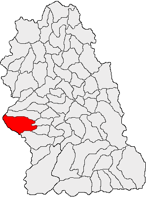 Categorie:Hărţi ale judeţului Hunedoara